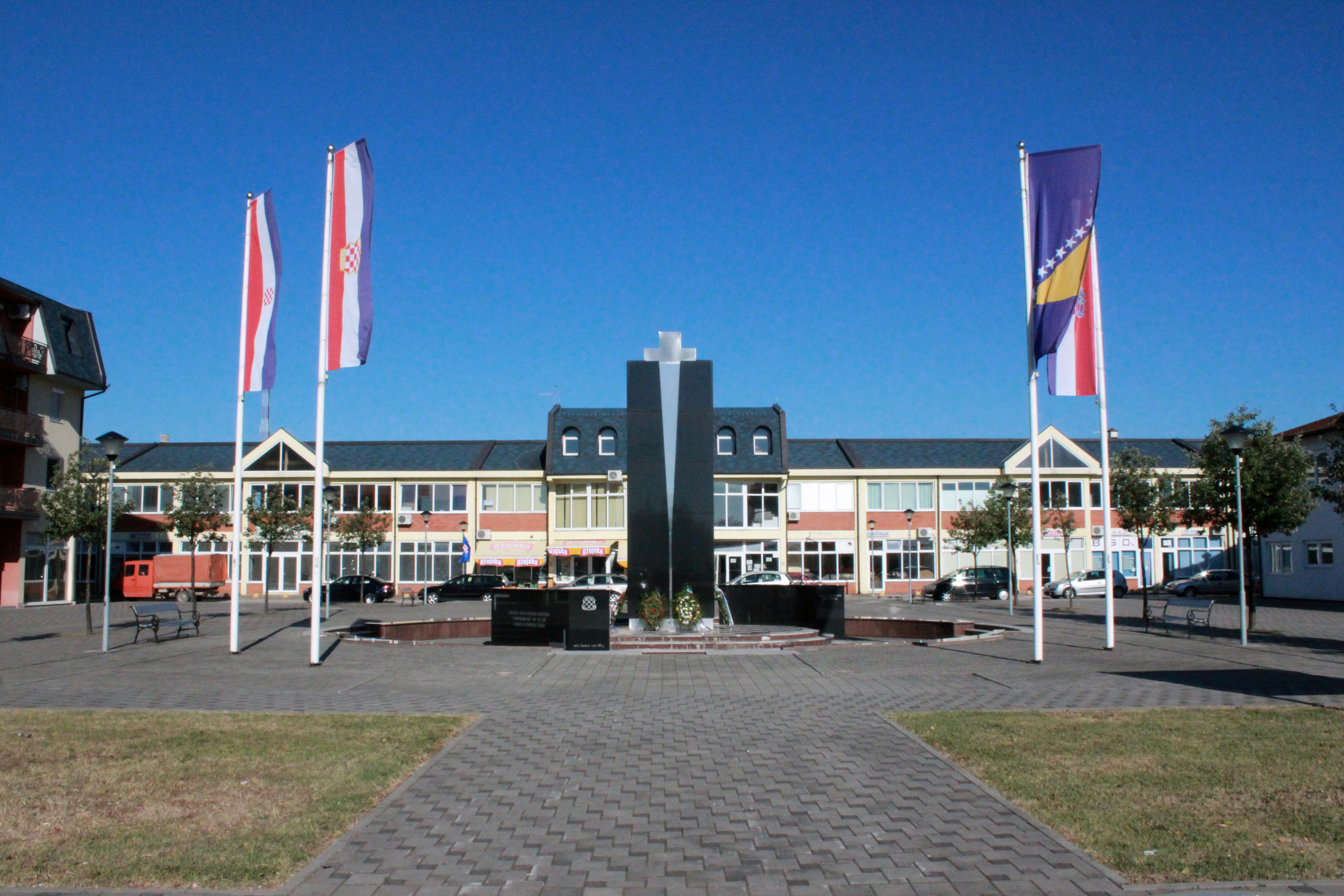 Central square in Domaljevac with the monument for the fallen soldiers in the fatherland war